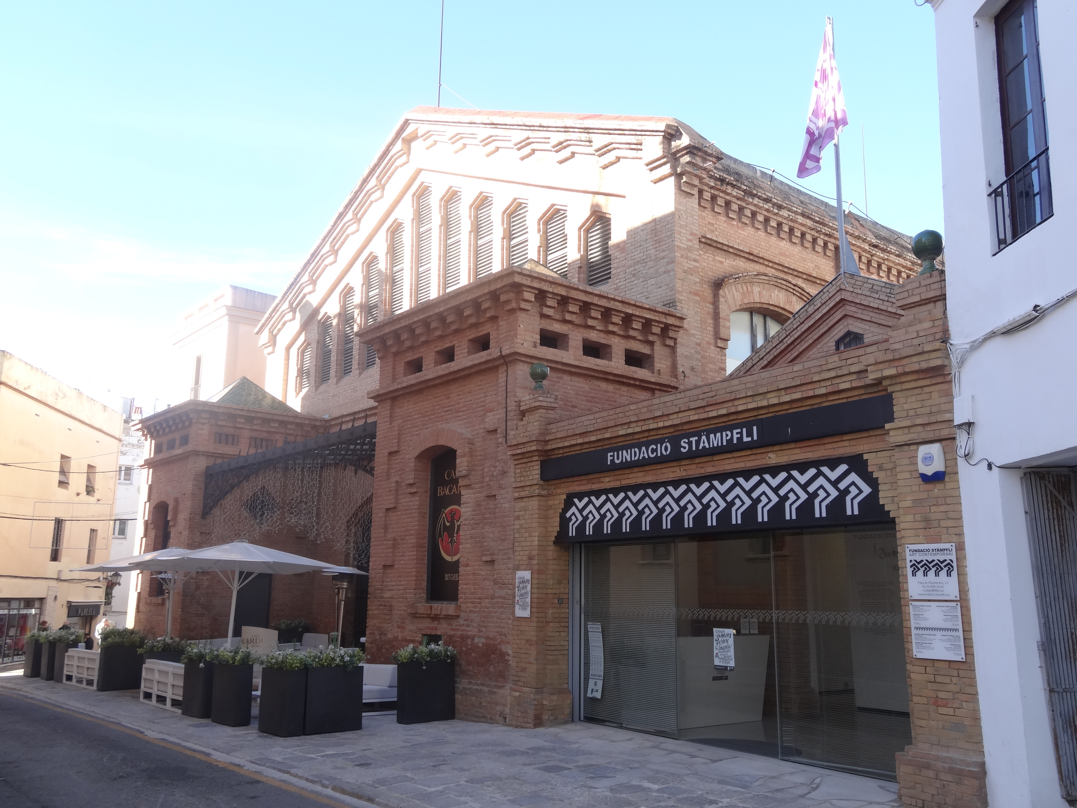 Sitges - Fundació Stämpfli i Casa Bacardí (antic mercat del peix)